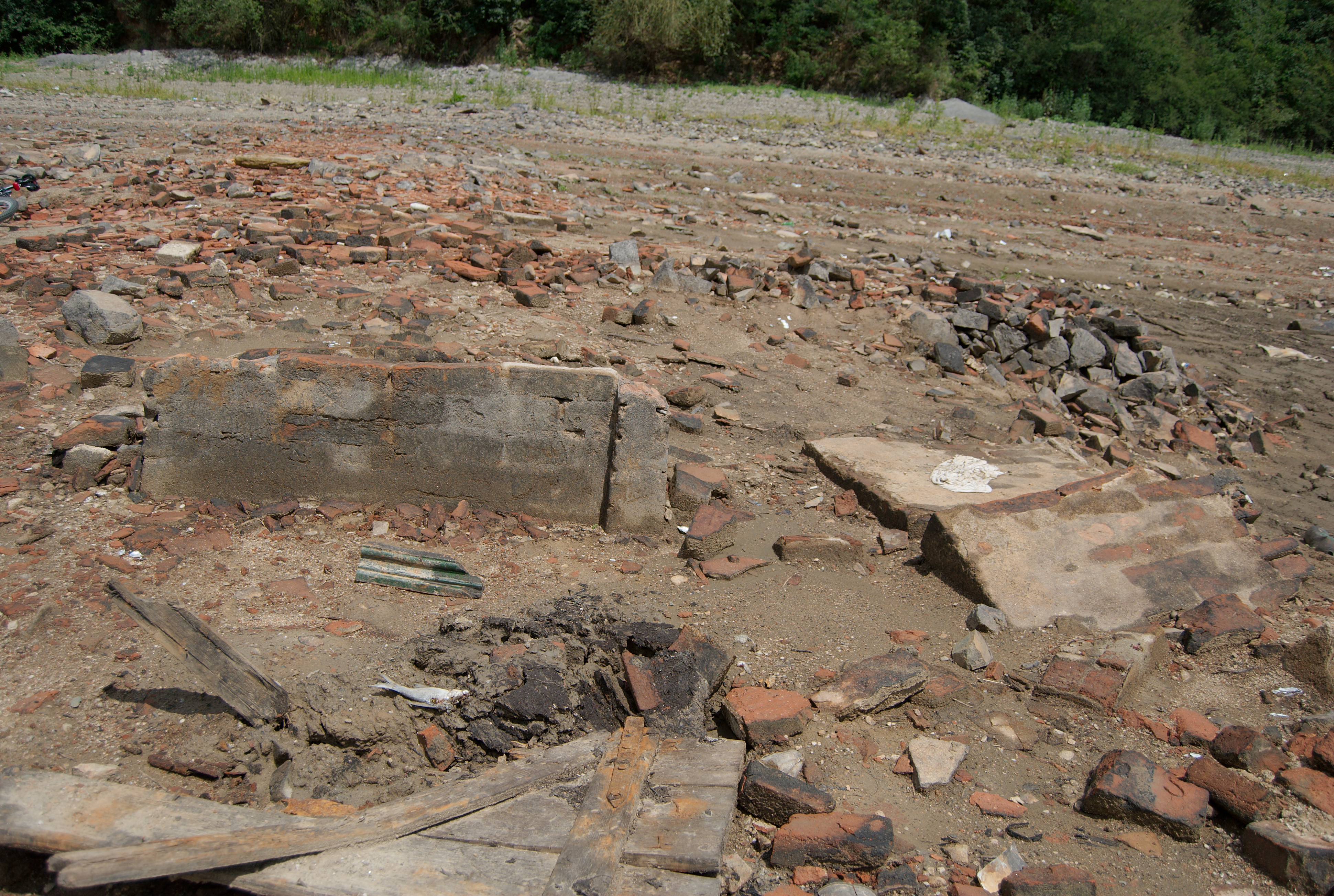 Staré Kníničky - zachovalé části zdí na částečně odkrytém části Brněnské přehrady